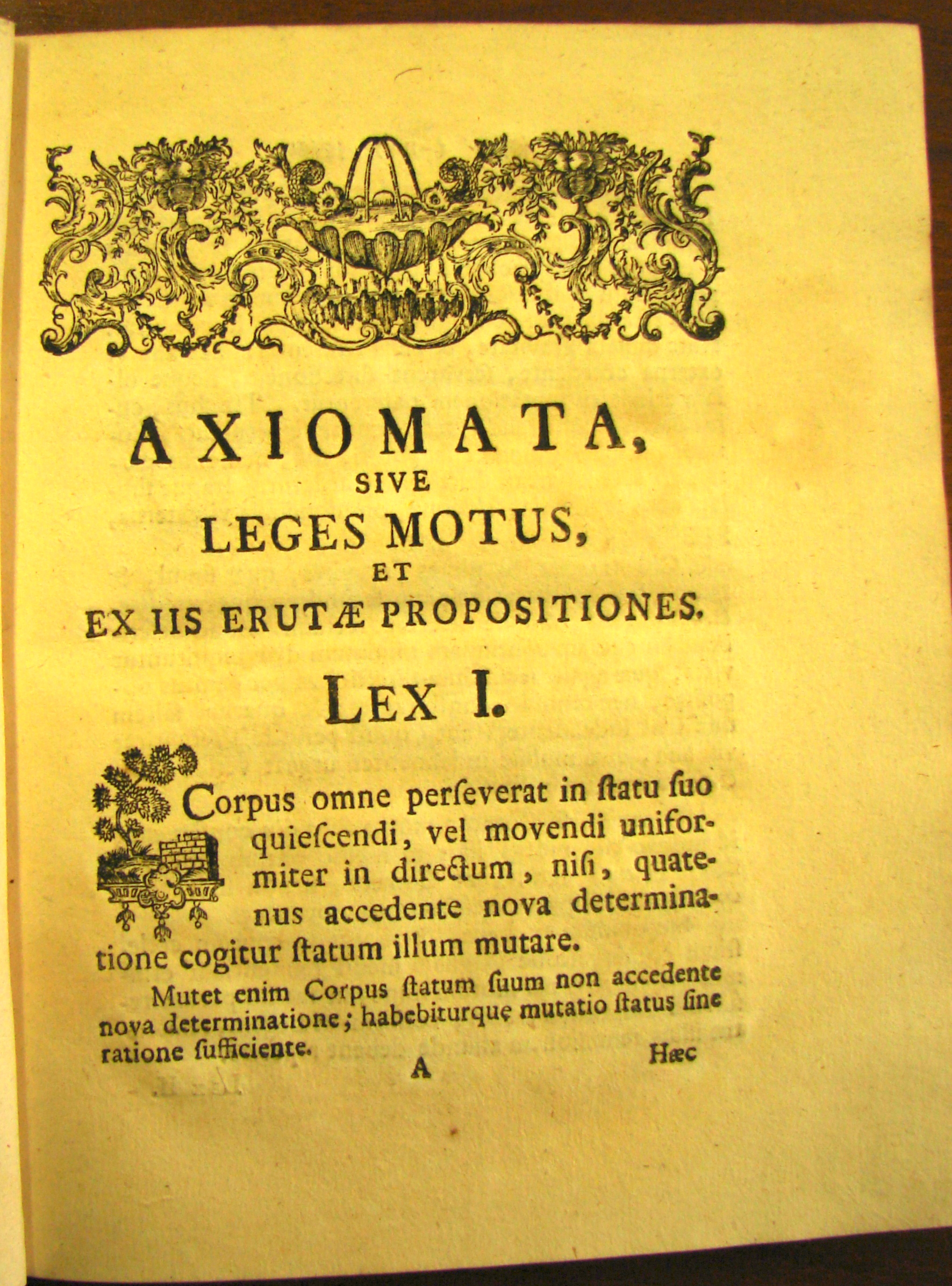 zákon setrvačnosti - ukázka díla